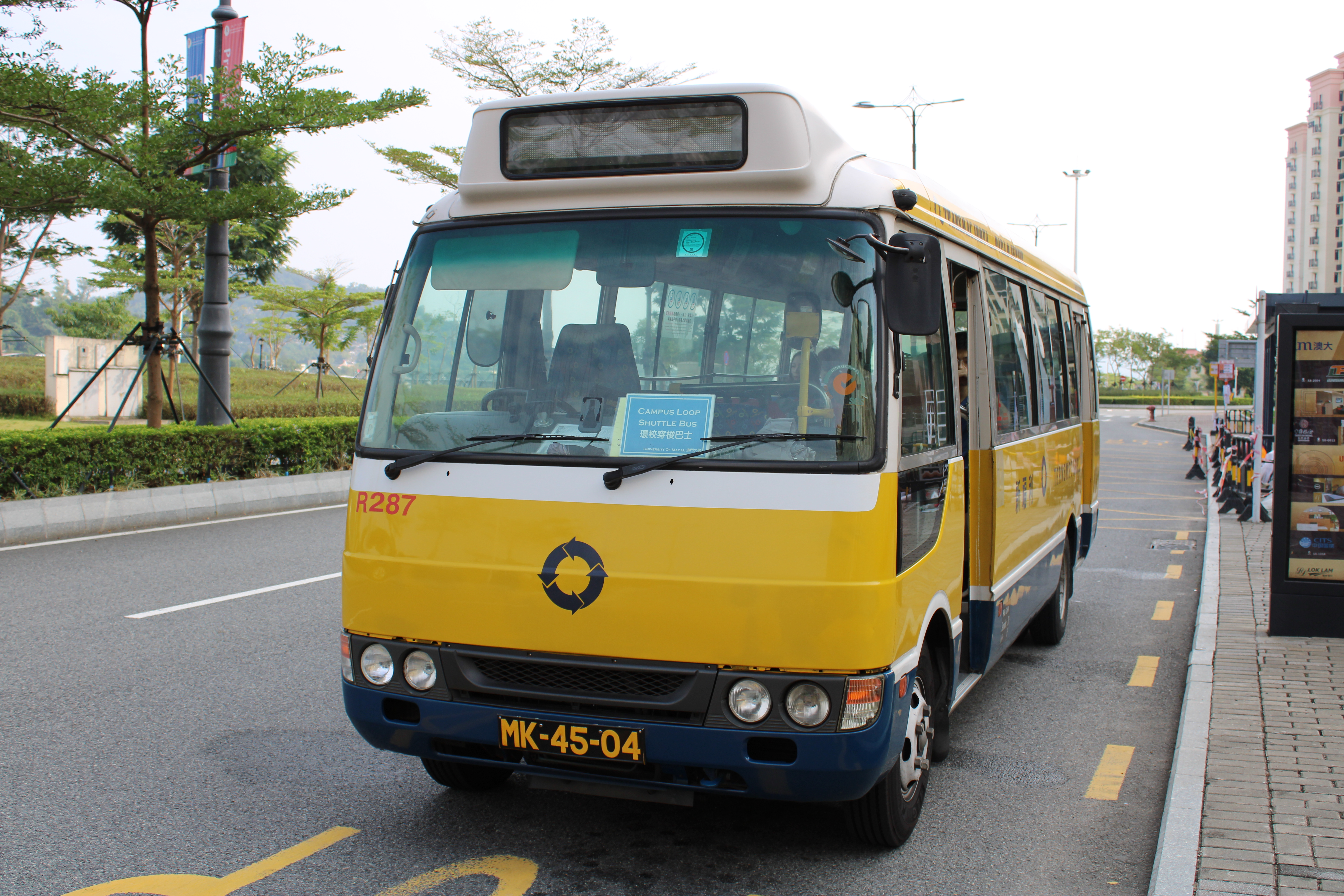 新福利三菱Rosa小巴，車隊編號R287行駛澳門大學環校穿梭巴士路線。